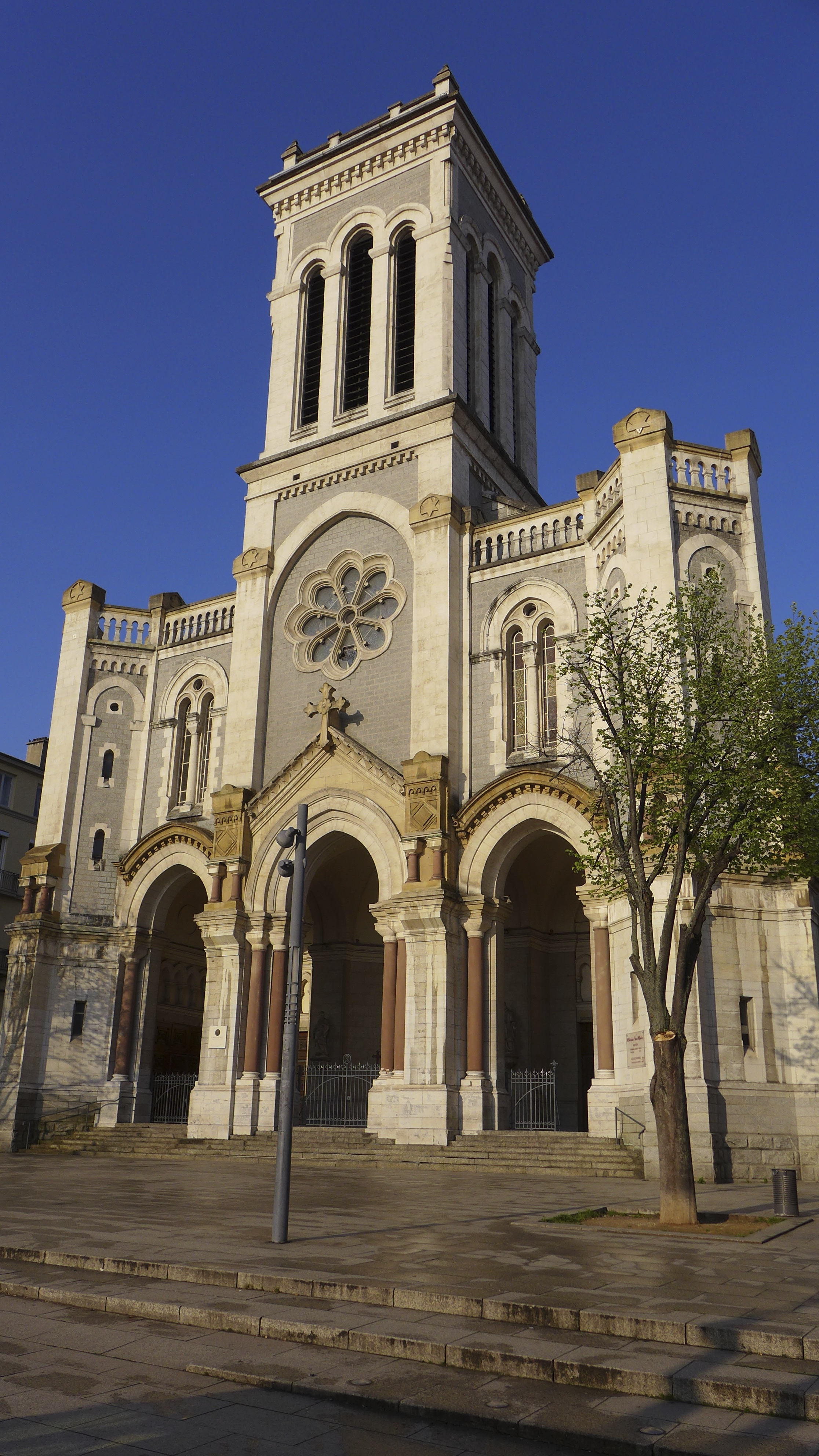 Vue de la cathédrale Saint-Charles Borromée, située Place Jean Jaurès à Saint-Etienne